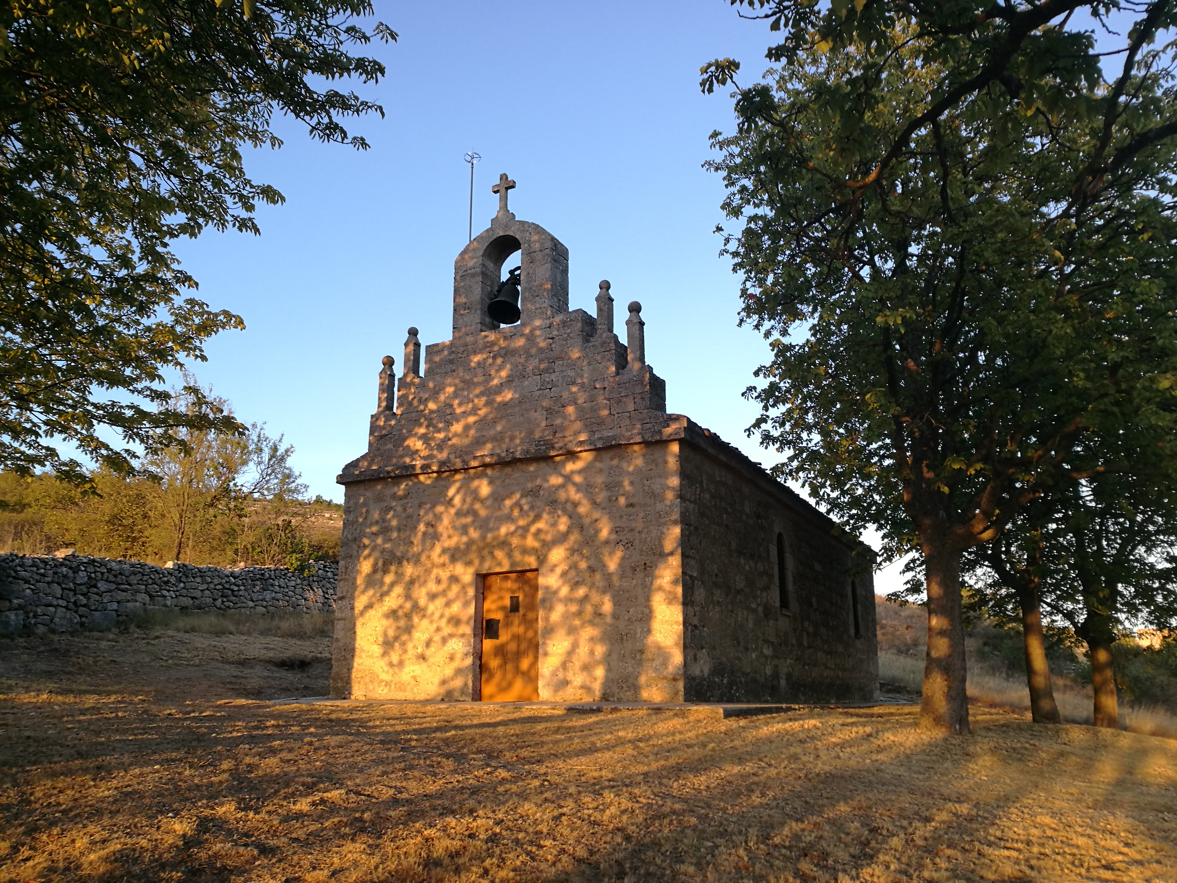 Villandiego, ermita de la Virgen de Lourdes